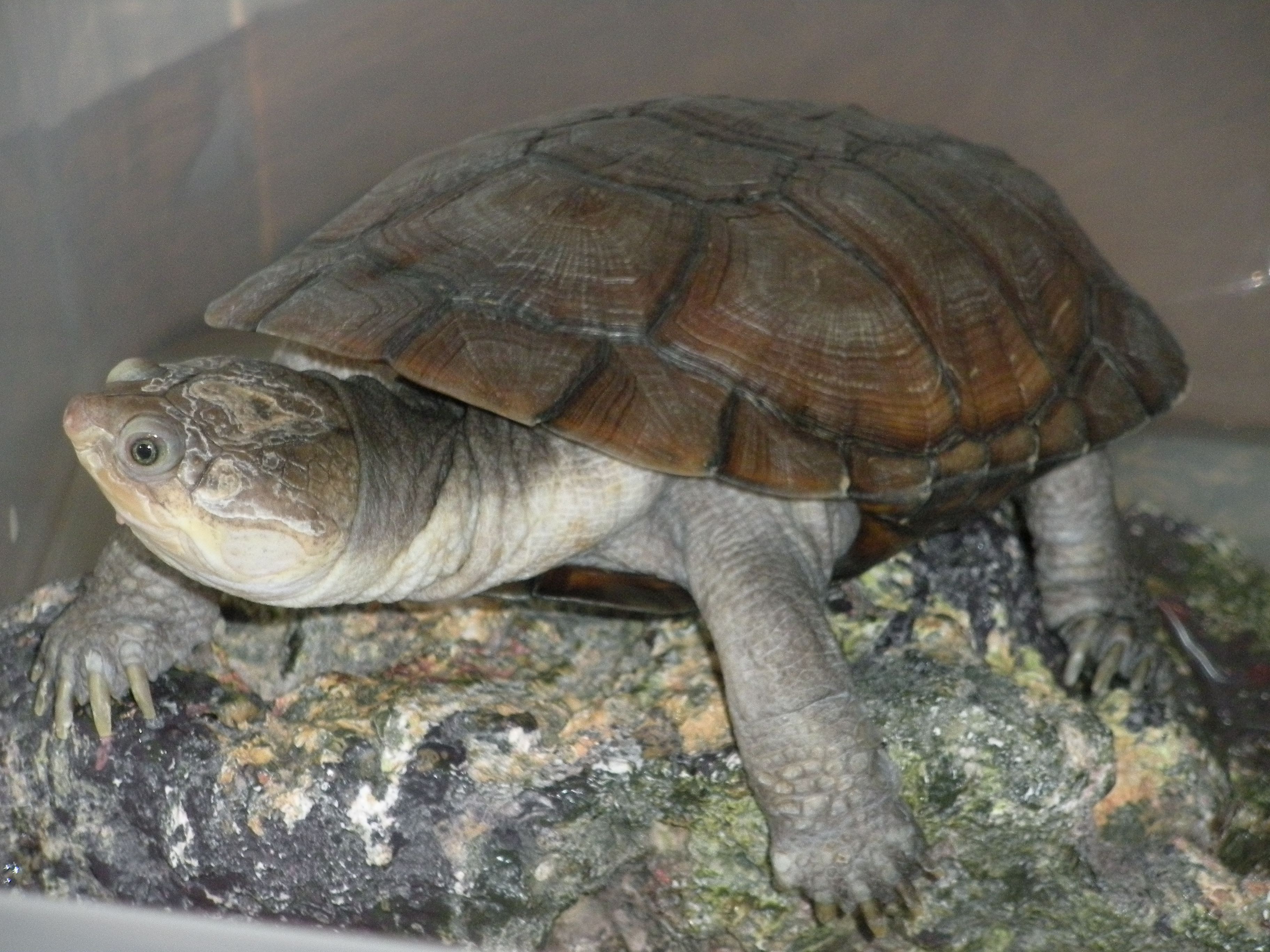 == Licenza d'uso: ==